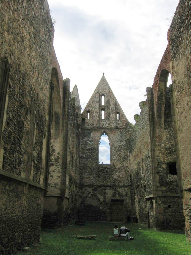 Pohled lodí kláštera v Dolních Kounicích k západu. View through the church nave of monastery in Dolní Kounice towards the west.